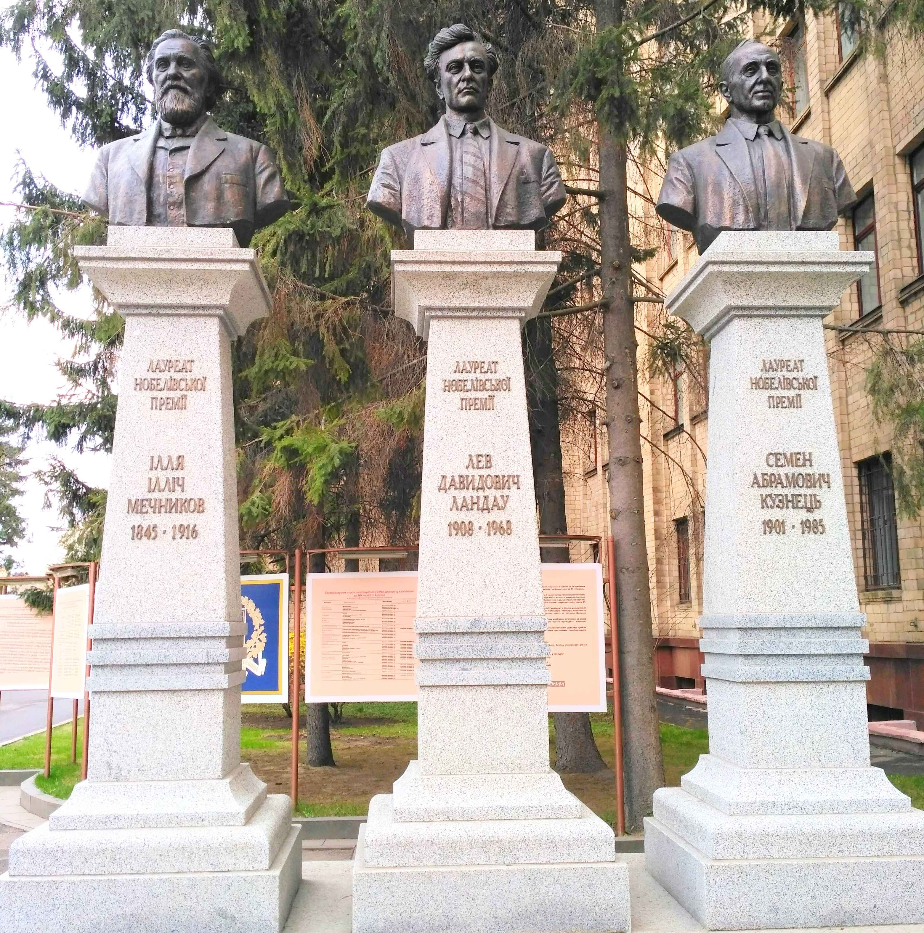 Памятник С.А. Кузнецу перед Харьковским Национальным Университетом среди других Харьковчан - лауреатов Нобелевской премии (И.И. Мечников, Л.Д. Ландау)